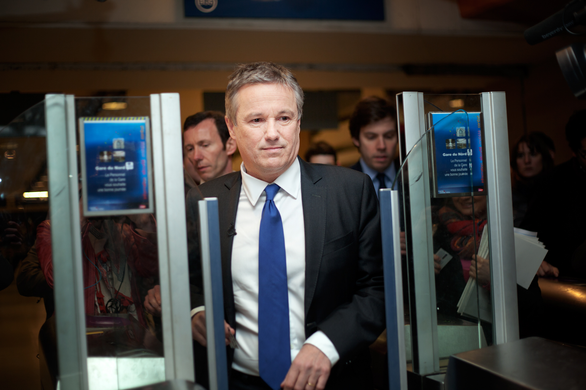 Nicolas Dupont-Aignan venu défendre les usagers des transports en 2012